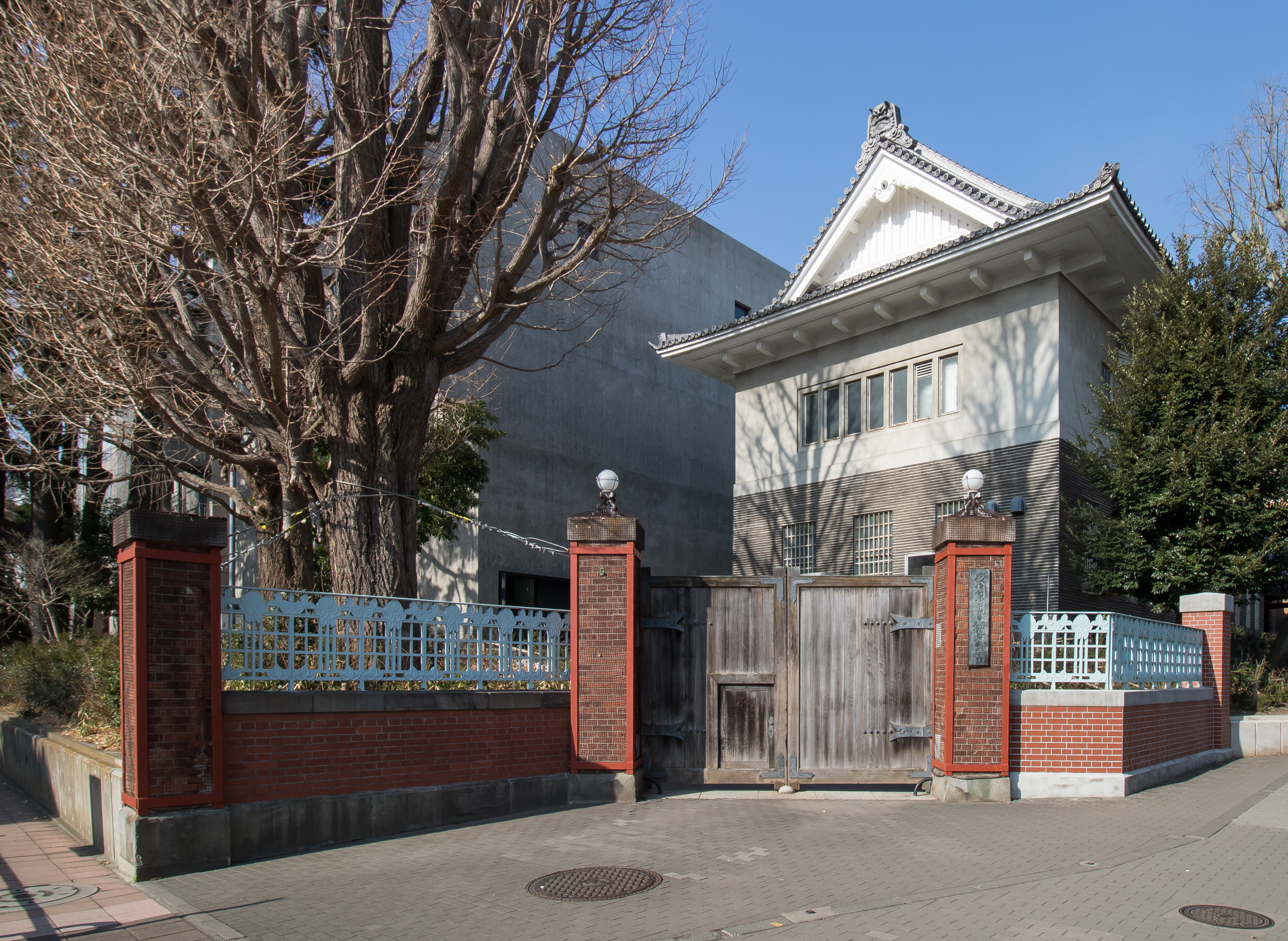 東京藝術大学 旧正門